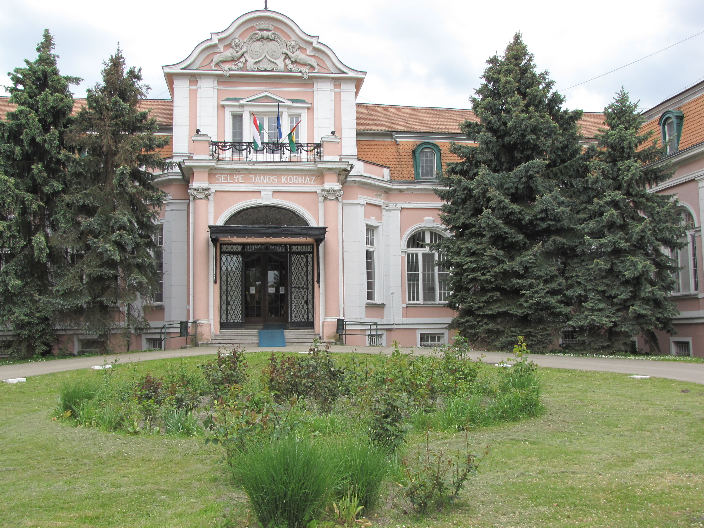 Hungary, Komárom, Szőny, a Solymosy-Gyürky kastély